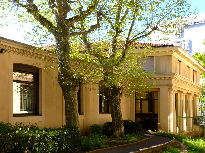 Réfectoire des lycéens, étudiants prépa.